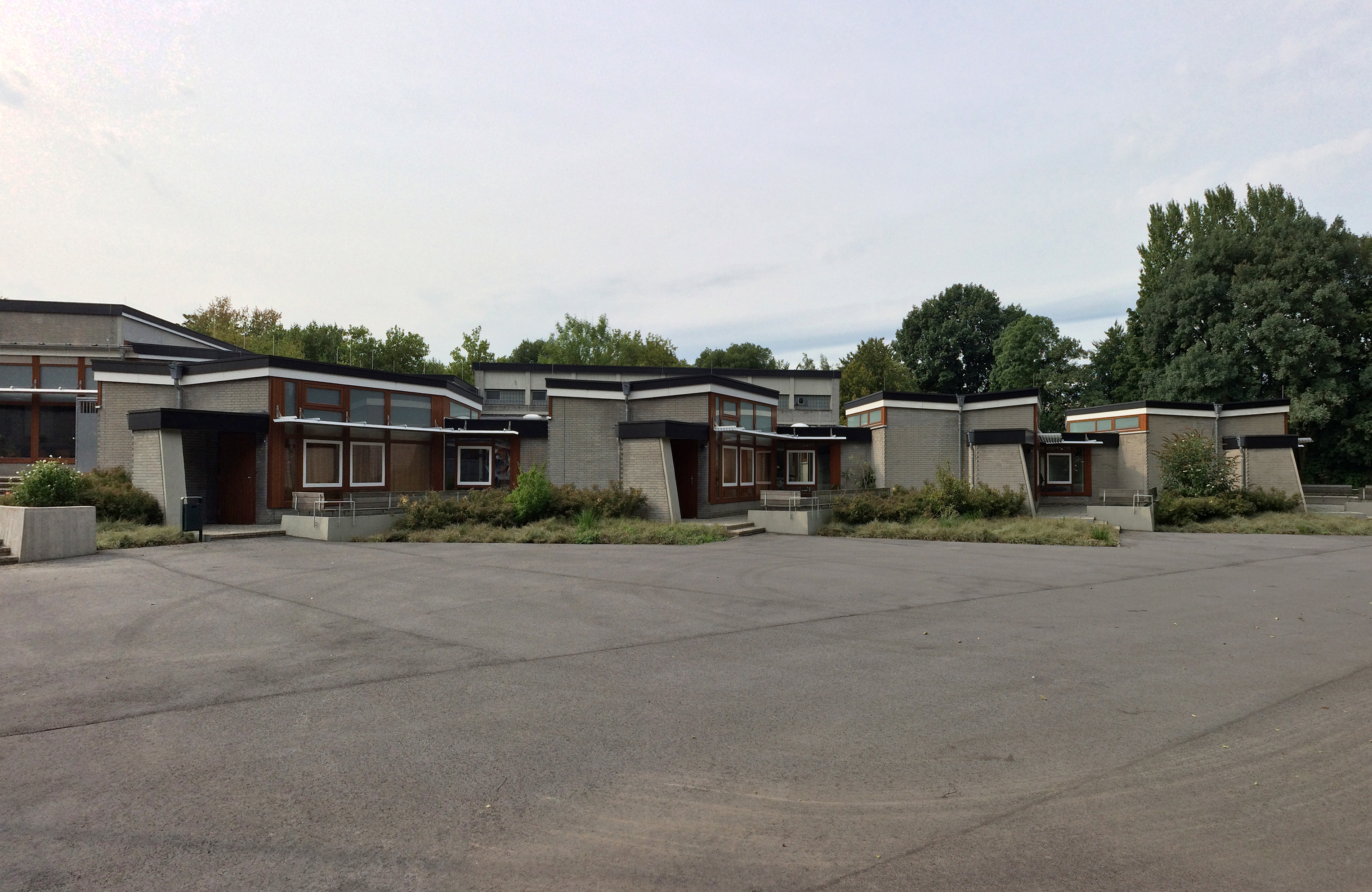 Scharoun-Schule Marl, Städtische Musikschule und Aloysius-Grundschule, Drewer-Süd, Entwurf 1960–1964, Ausführung 1968–1971, Hans Scharoun, Michael Hellgardt